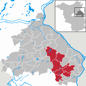 Amt Seelow-Land in Brandenburg (Country) - District Märkisch-Oderland